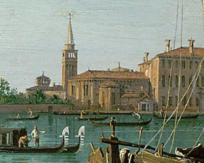 Veduta della Giudecca dalla Punta della dogana, dipinto di Canaletto detail